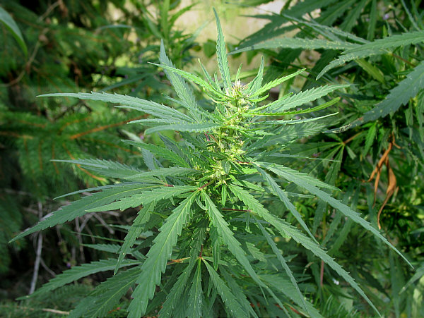 Hanf in Brandenburg (cannabis ruderalis)